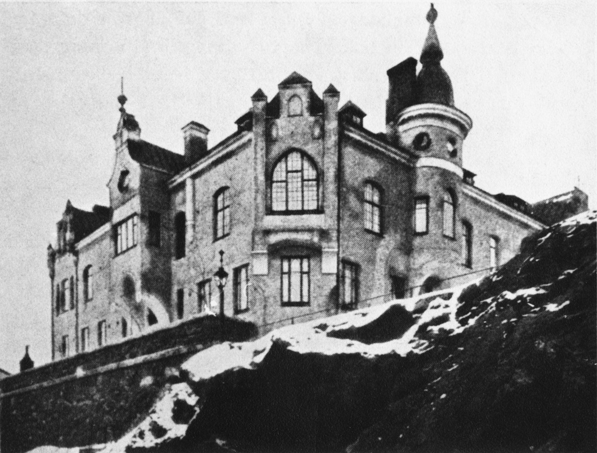 Meritullinkatu 33 (Konstantininkatu), Kristianinkatu 4. Arkkitehti Bruno F. Granholm, valmis 1900. Rakennuttaja Claes Gripenberg. Taloa on muutettu ja korotettu, muutostyöt valmiit 1929. Rakennuksessa on toiminut Kulmakoulu 1928-82.